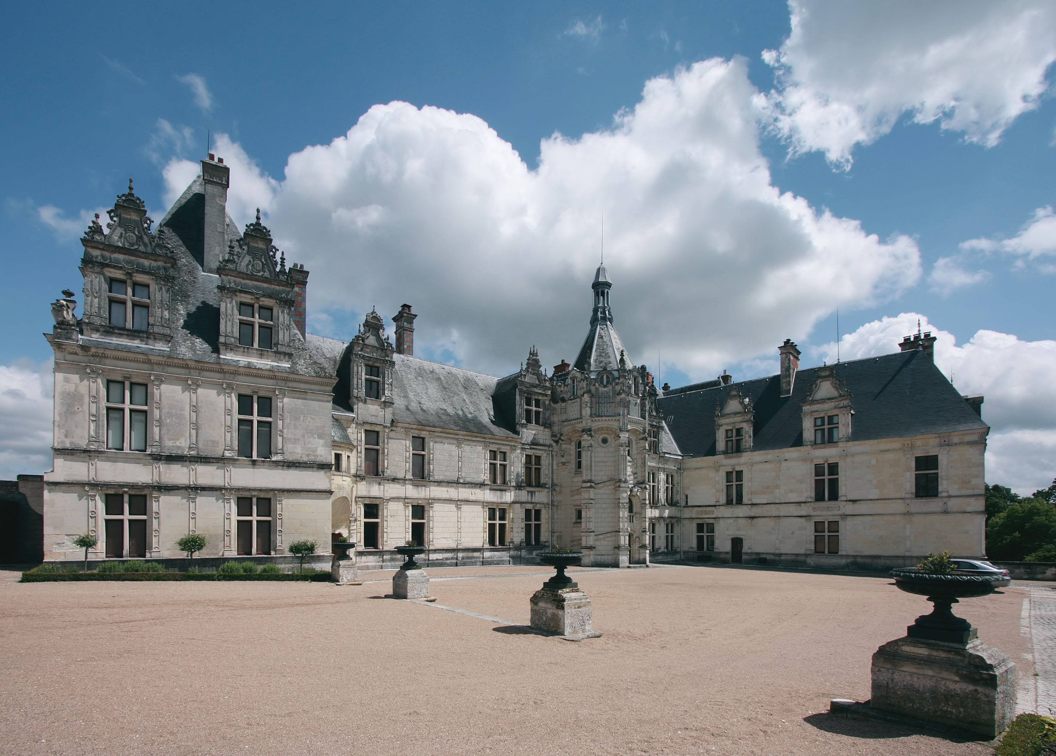 Schloss Saint-Aignan, Département Loir-et-Cher/Frankreich - Schlosshof